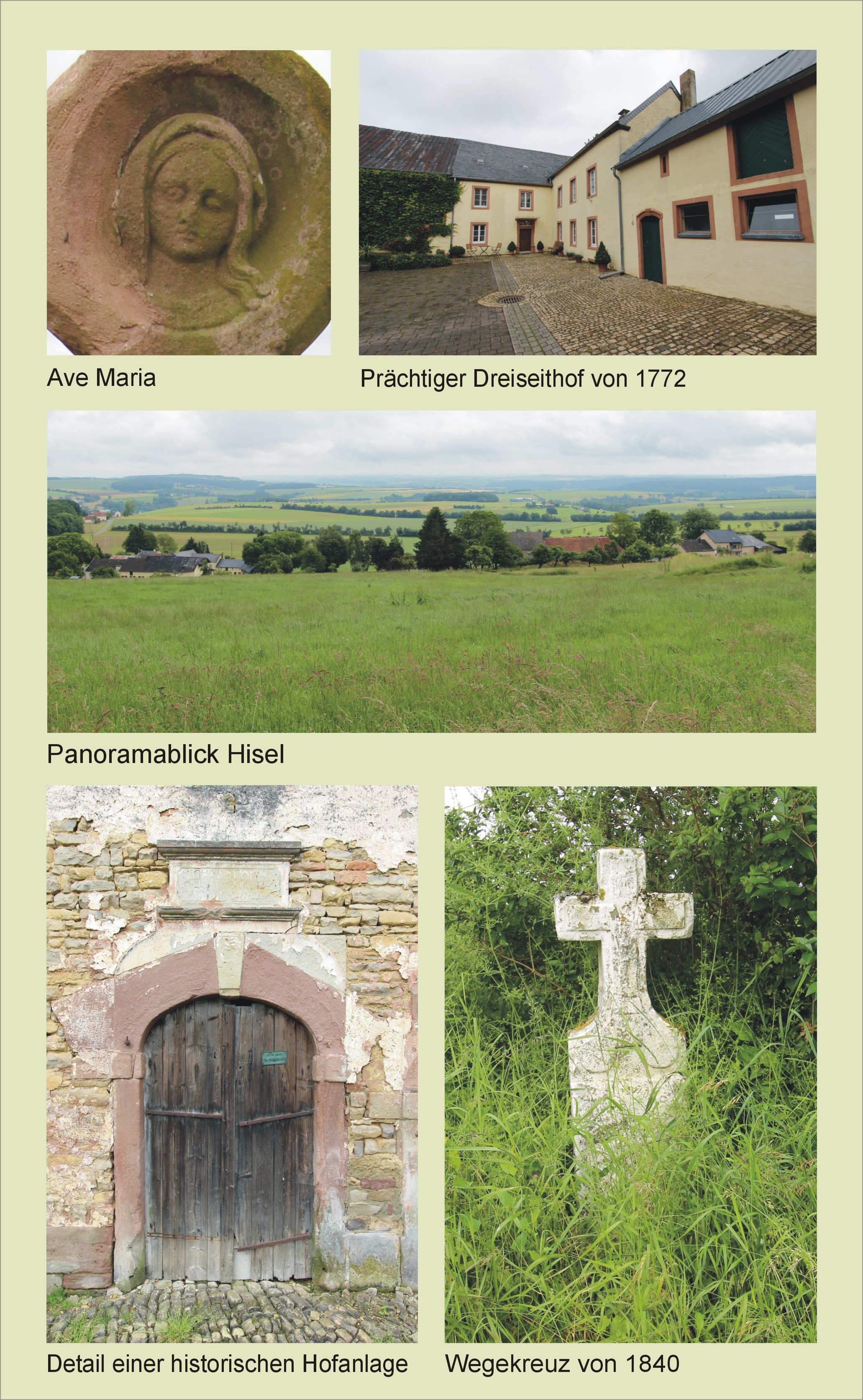 54646 Hisel (Eifel); Sehenswürdigkeiten. Aufnahme von 2016.